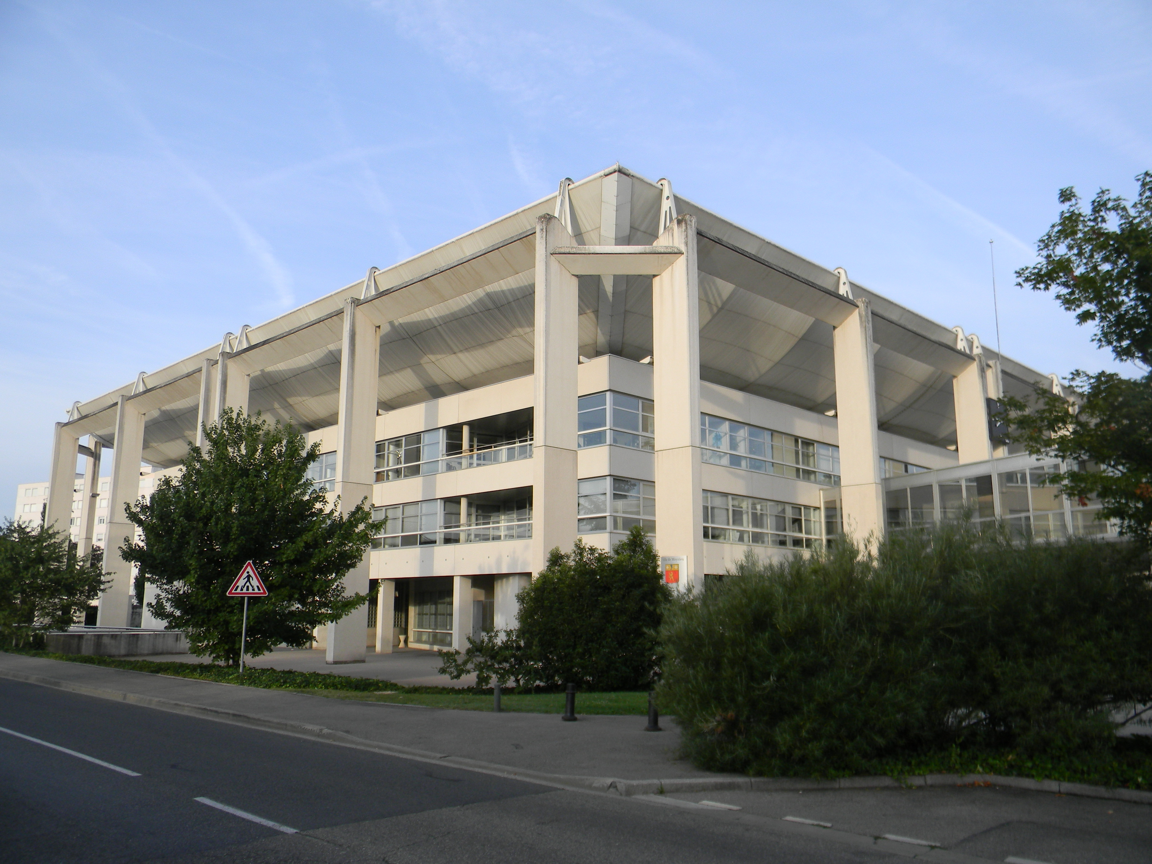 Hôtel de ville de Meyzieu.